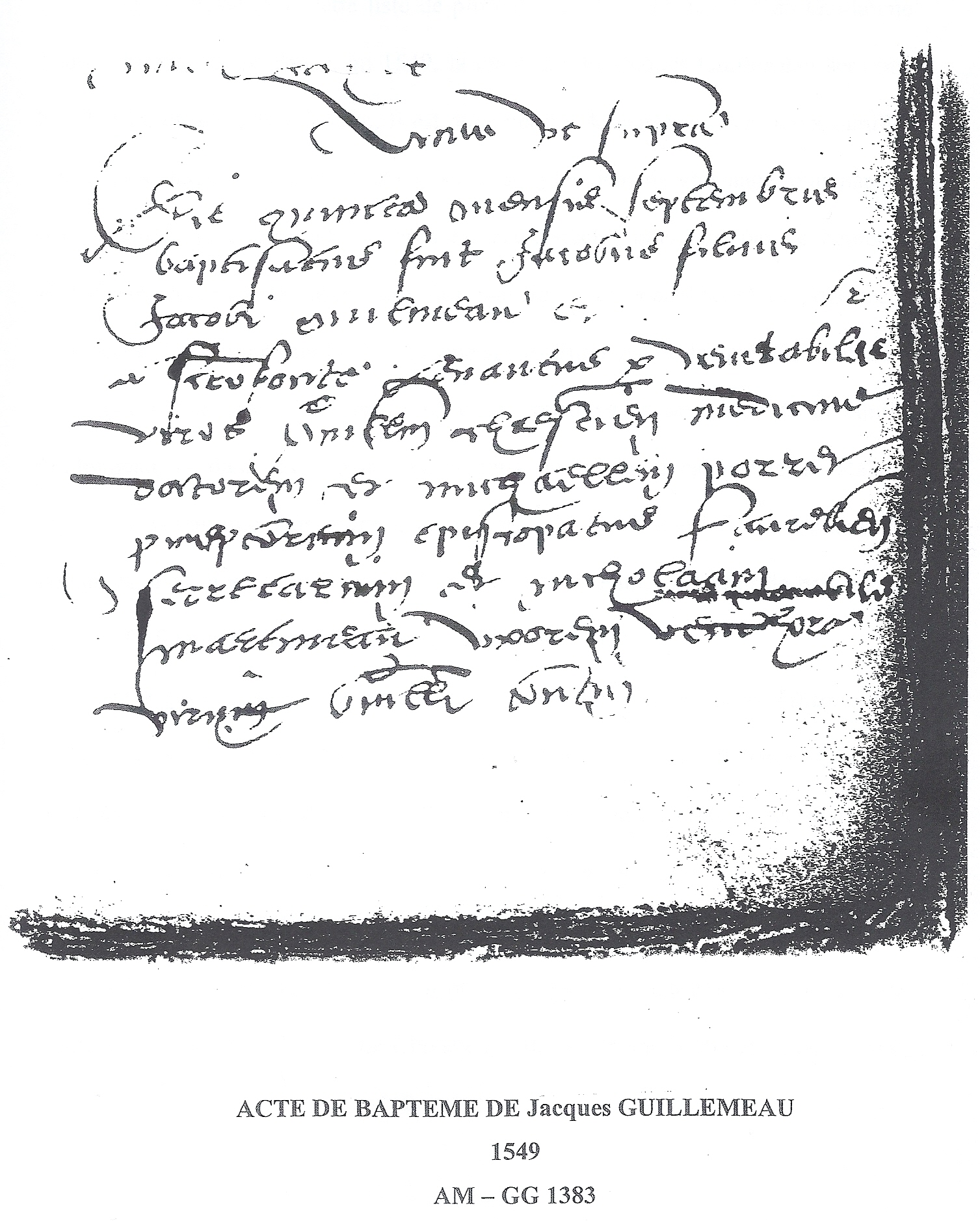 "De Quinte Mens Soptembris 1549, Baptistus Fuit Jacobus Filius Jacobi Guilmeau a sacrofonte levantis per venerabilis viros Guillelmum Chrestien medicinae doctorem et Michaellus Perret espiscopatum aureliensis secretarium et Nicolus Martineau uxorem honorabilis virum Guillelmum Toutin". Ce que l'on peut traduire par : "Le cinq septembre 1549 fut baptisé Jacques Guillemeau, fils de Jacques Guillemeau. Parrains, Guillaume Chrestien, Docteur en médecine et Michel Perret, Secrétaire de l'Evêque d'Orléans. Marraine, Nicole Martineau, épouse de l'honorable Guillaume Toutin".